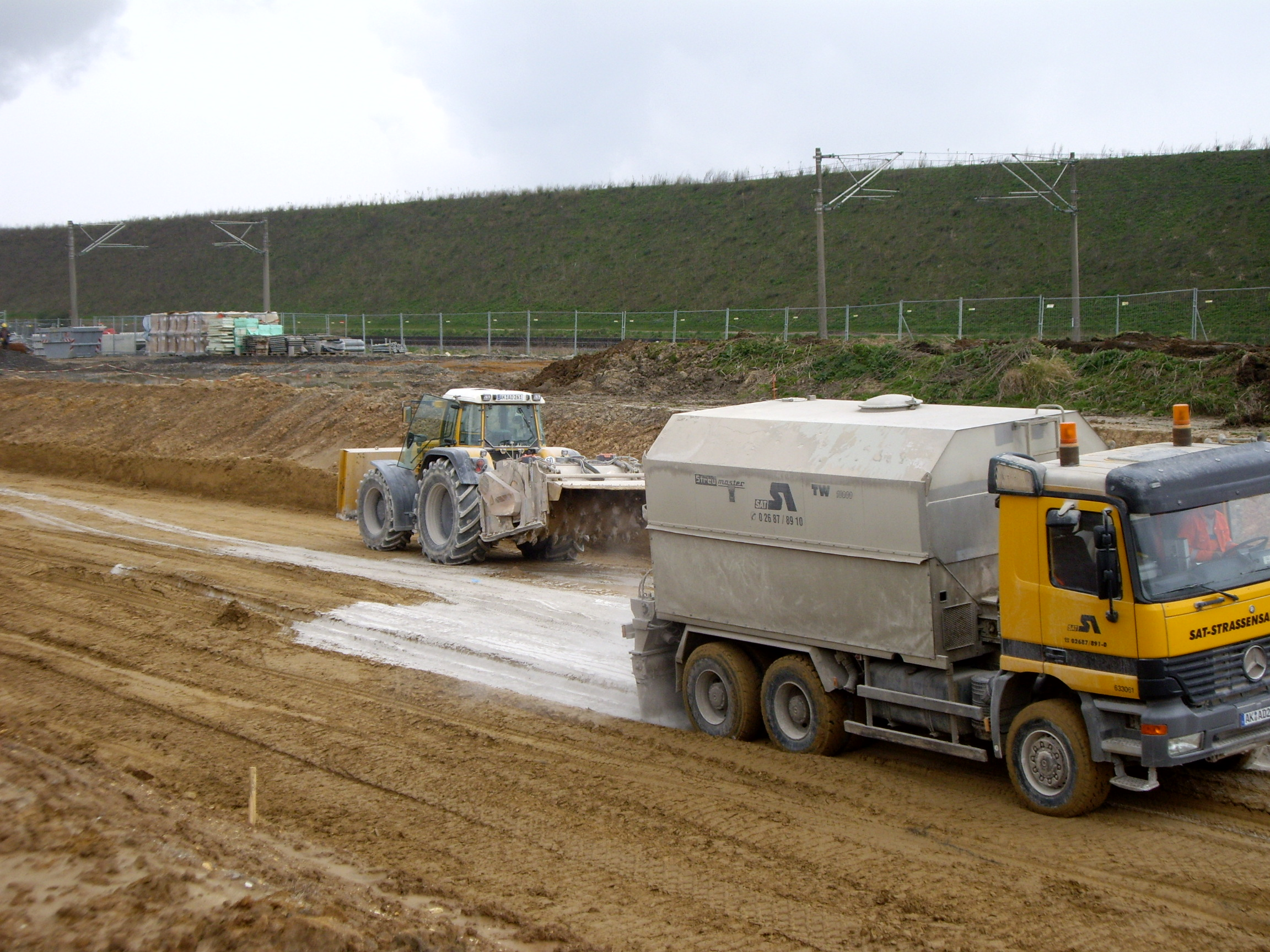 Ein Bindemittelstreuer und ein Fendt Vario 930 mit Anbaustabilisierer im Einsatz